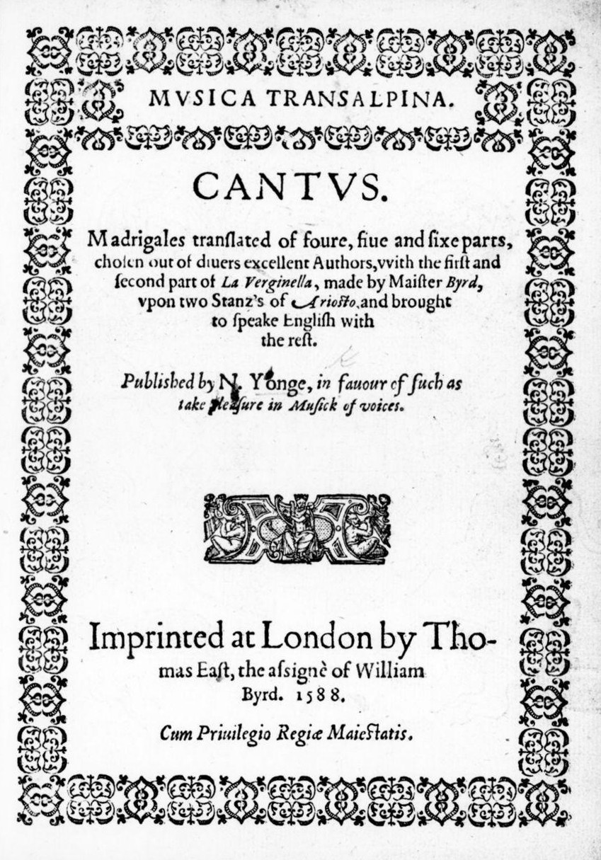 Page de titre du recueil Musica transalpina, édité par Nicholas Yonge en 1588.